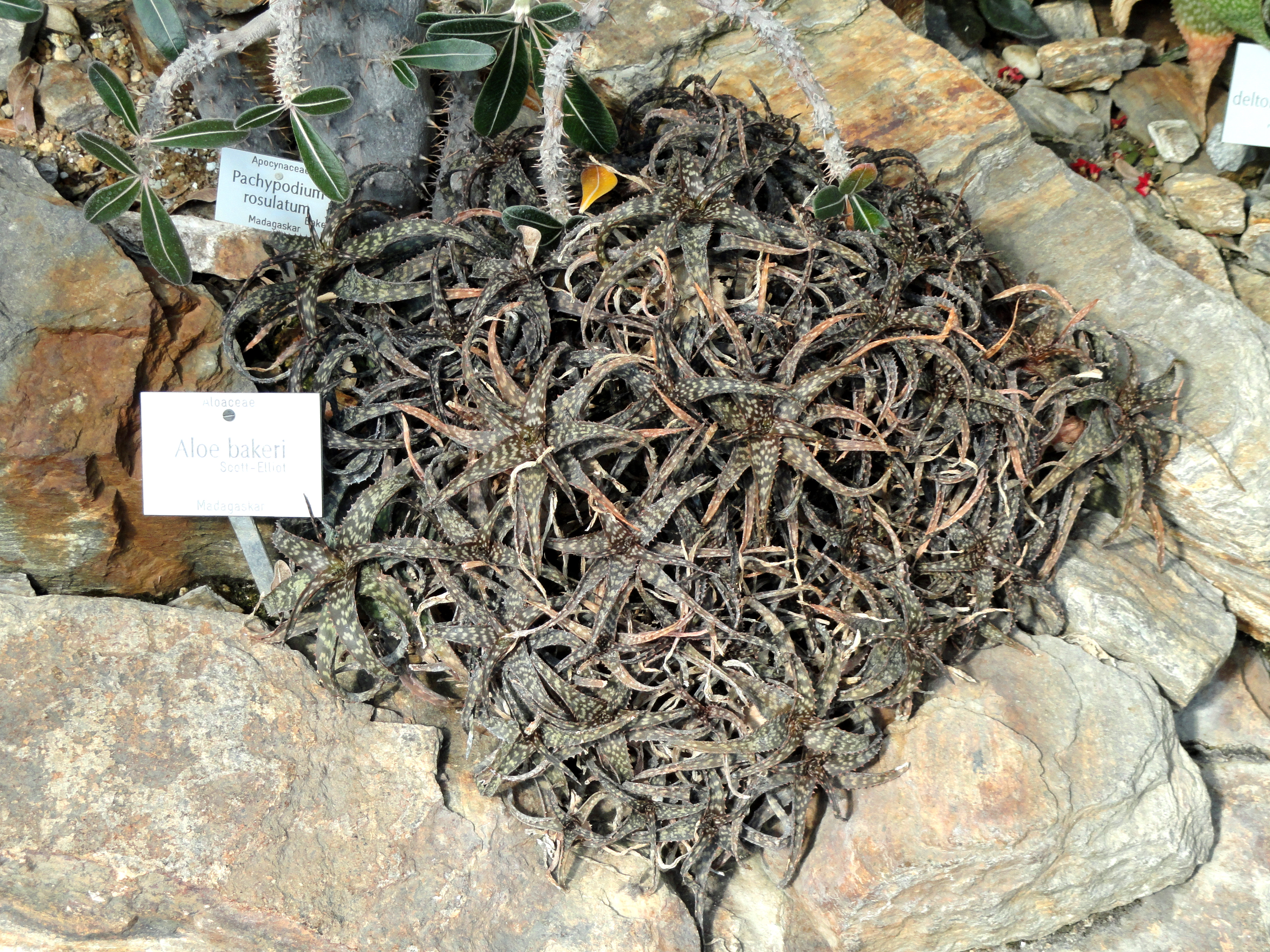 Aloe bakeri specimen in the Botanischer Garten München-Nymphenburg, Munich, Germany.